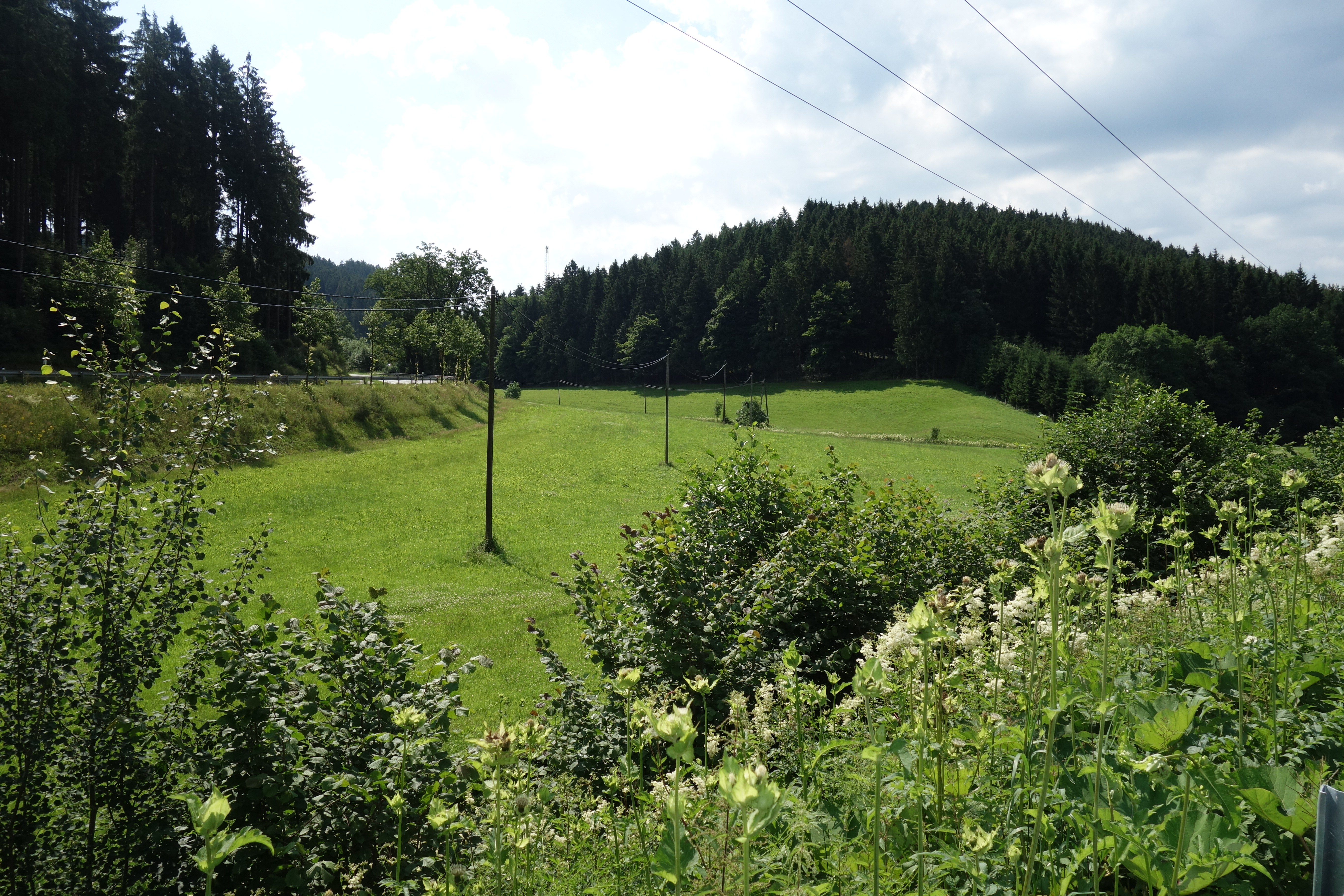 Grünland gehört zum Landschaftsschutzgebiet Talräume der Bieke (Nordbereich) und der Kleinen Henne bei Bonacker und Wald zum LSG Meschede.